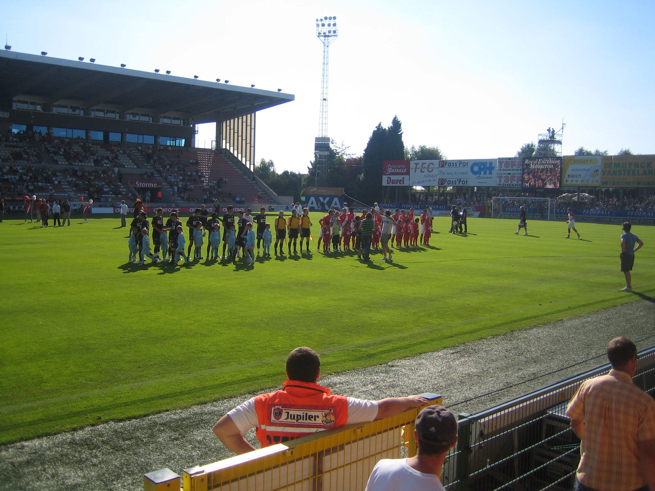 Coup d'envoi Royal Excelsior Mouscron -KAA Gent ( Jupiler League), le 6 août 2007.